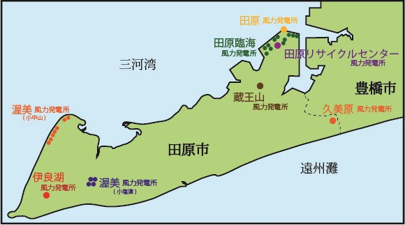 愛知県田原市にある出力300kw以上の風力発電所一覧図(2011年5月時点)